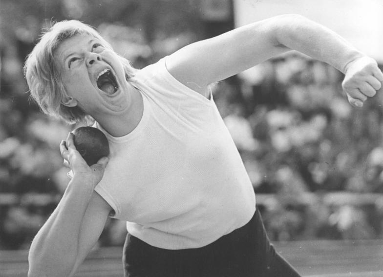 Johanna Hübner Zentralbild Kohls 02.10.1963 Leichtathletik Olympianormen erfüllt. Bei einem Sportfest im Hallenser Kurt-Wabbel-Stadion erfüllten die Leichtathleten der DDR am 01.10.1963 trotz kühler Witterung und Regennasser Bahn nicht weniger als 13 mal die Normen für die Olympischen Spiele 1964 im Tokio. UBz: Im Kugelstoßen war Johanna Hübner mit 16,32 m erfolgreich (SC DHfK Leipzig) .